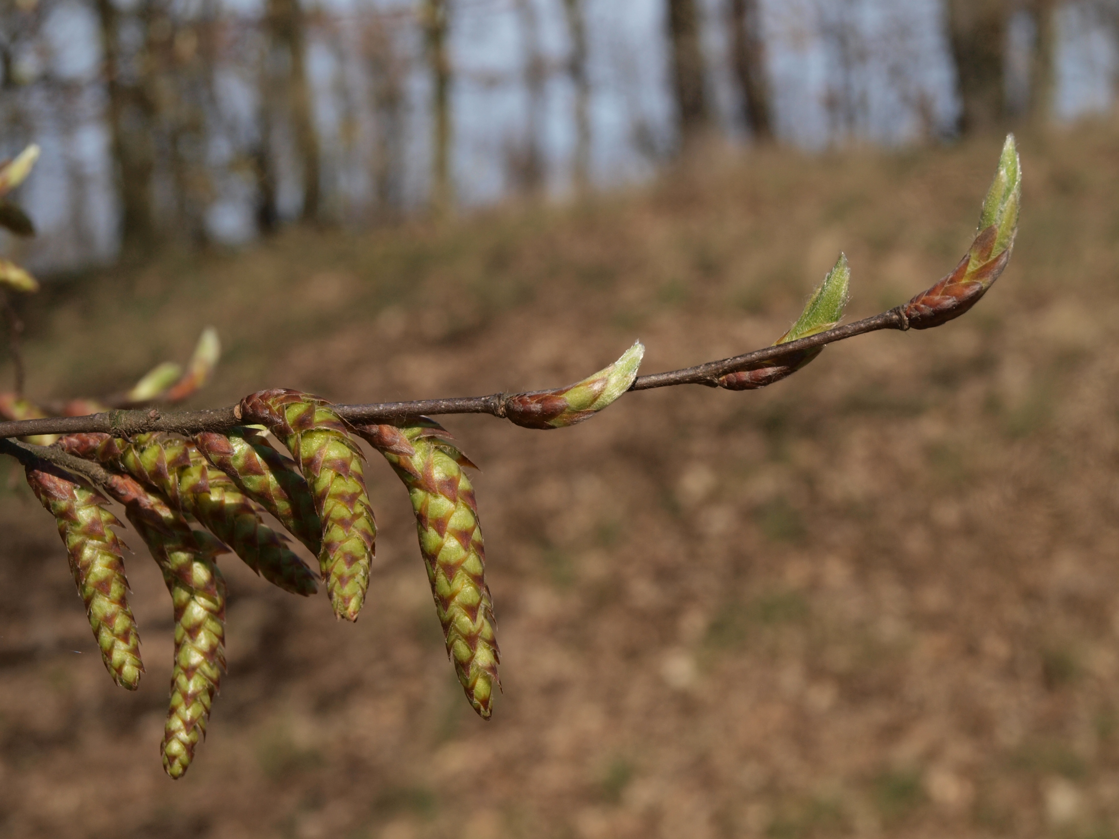 rašení a butonizace habru obecného; fotografie vznikla pro vzdělávací potřeby ČHMÚ